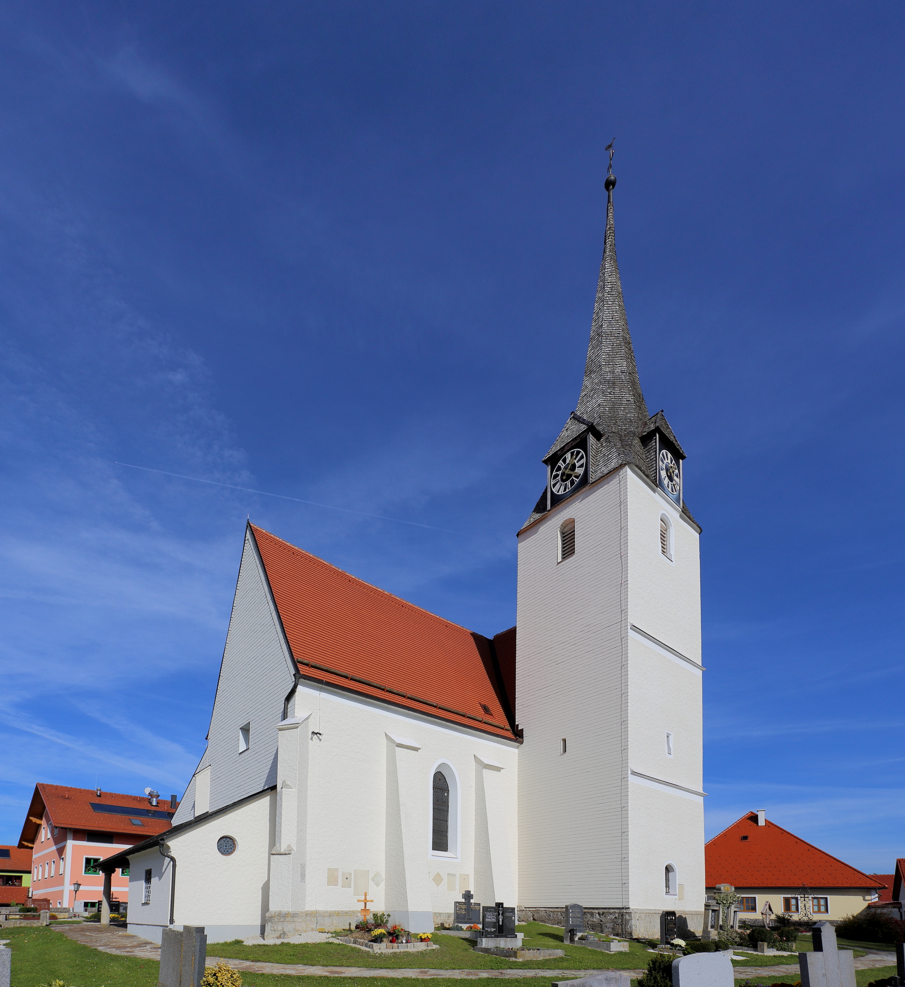 Südwestansicht der katholischen Pfarrkirche hl. Margarethe in der oberösterreichischen Gemeinde Mörschwang. Ein gotischer Sakralbau, der 1523 geweiht wurde; mit einem mächtigen Turm im südlichen Chorwinkel, einem einschiffigen, dreijochigen Langhaus und einem gleich breiten einjochigen Chor.